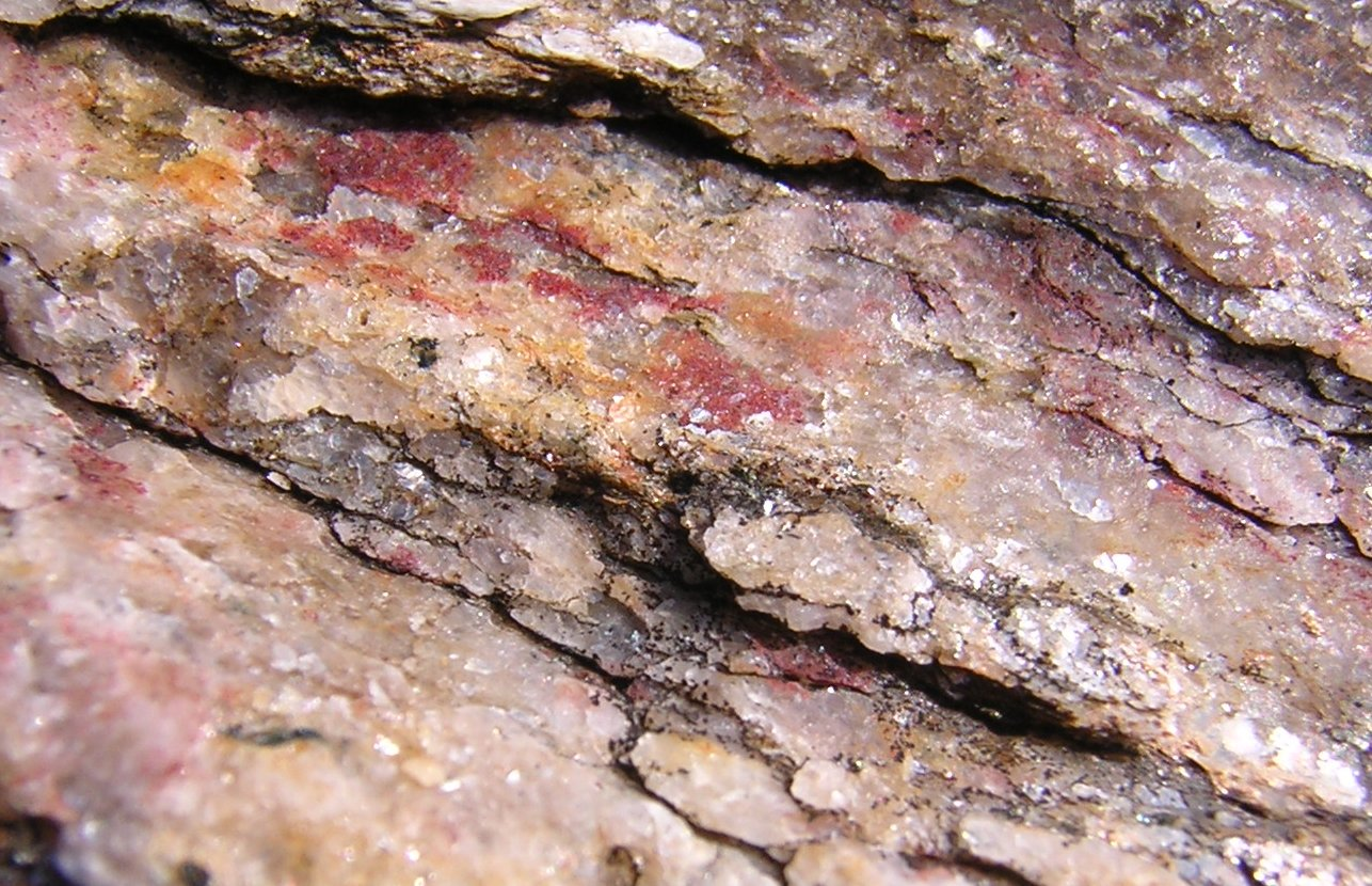 Inclusions de grenats dans du micaschiste. île de Groix, pointe des chats, Morbihan.